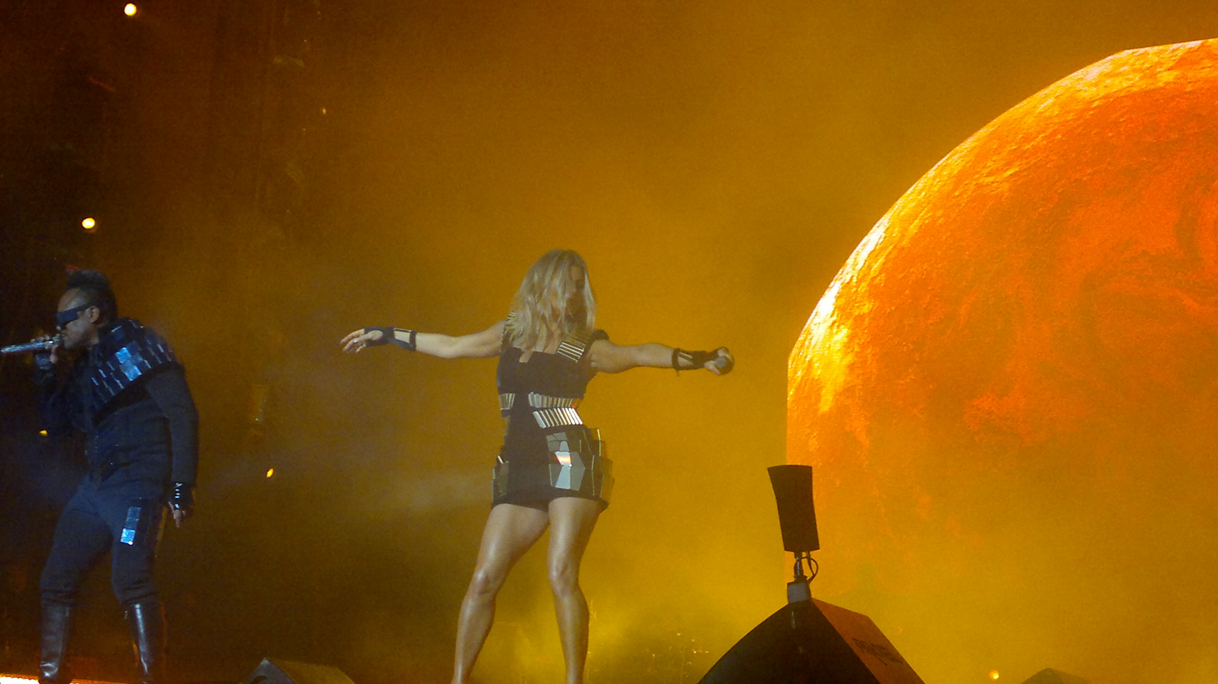 Fergie en la apertura del concierto en Paraguay por primera vez y antes mas de 60.000 personas.